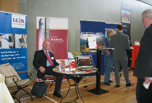 Bild von der Gewerbeschau 2006 in Greifenberg bei Hardy's